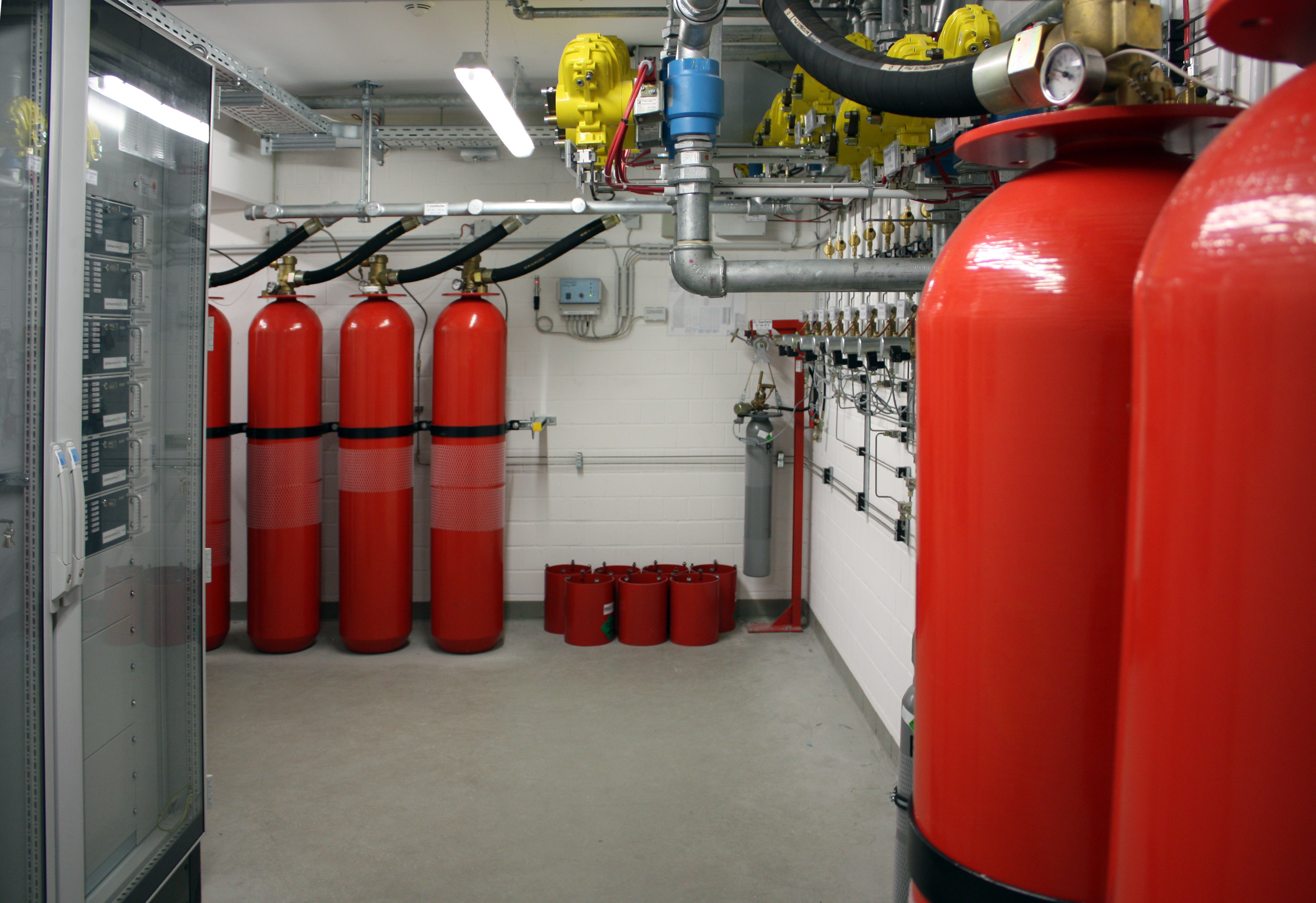 Historisches Archiv des Erzbistums Köln, Brandschutzeinrichtungen zur Sicherung des Archivgutes